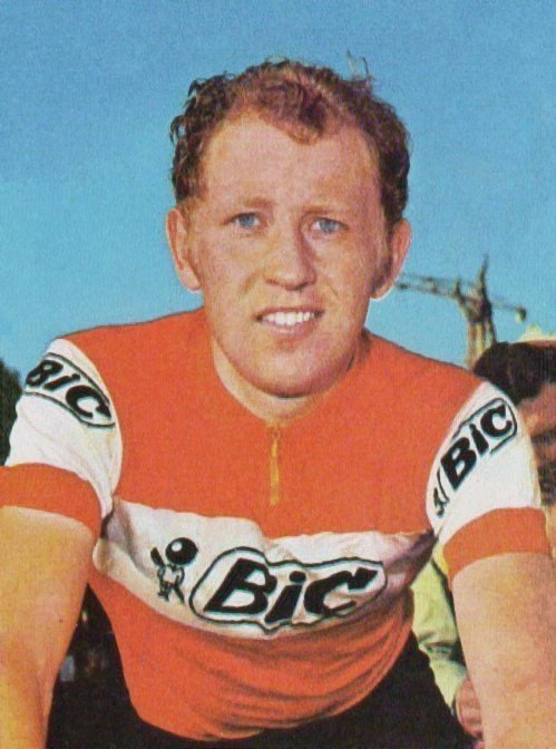 FIGURINA PANINI CAMPIONI DELLO SPORT ANNO 1973/74 N. 150 CICLISMO MORTENSEN